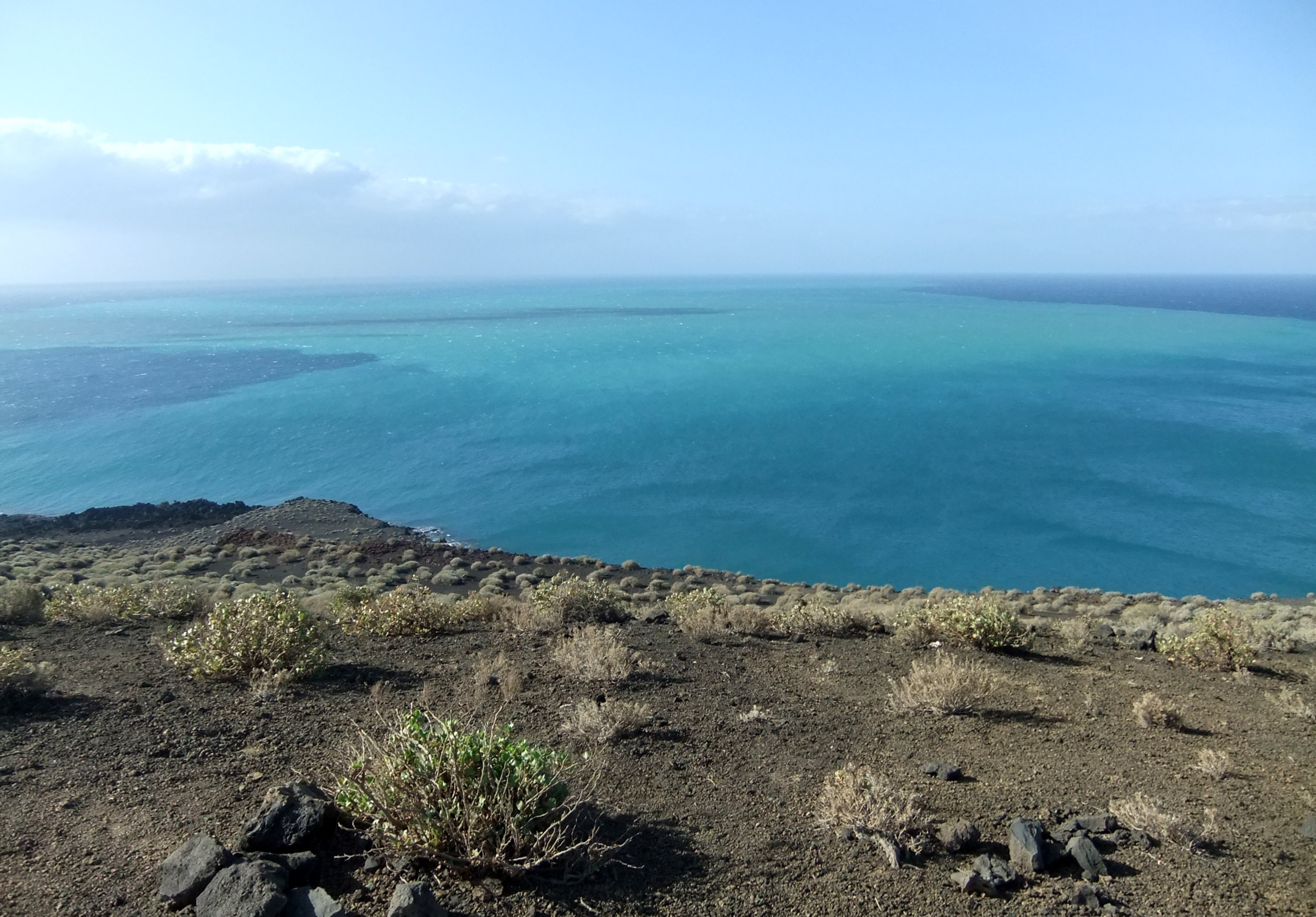 Türkisfärbung des Meerwassers in Folge des unterseeischen Vulkanausbruchs vor La Restinga (Kanarische Inseln) im Februar 2012